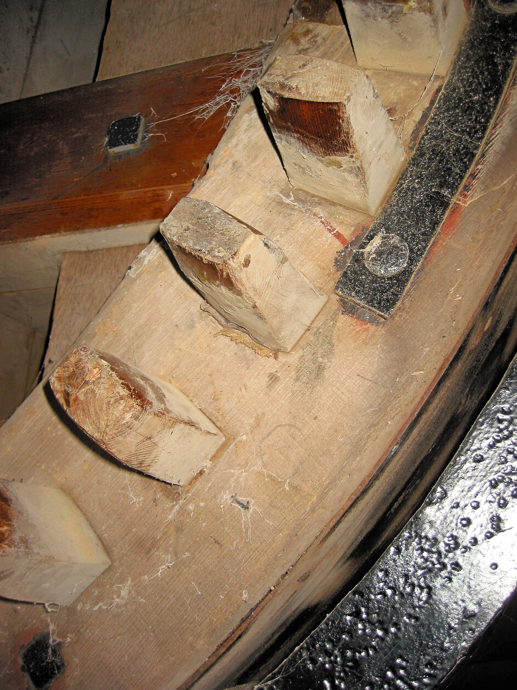 Met zeildoek aan de werkzijde vastgezette kam